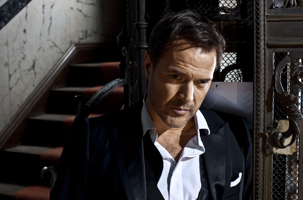 Sebastian Koch porträtiert von Oliver Mark